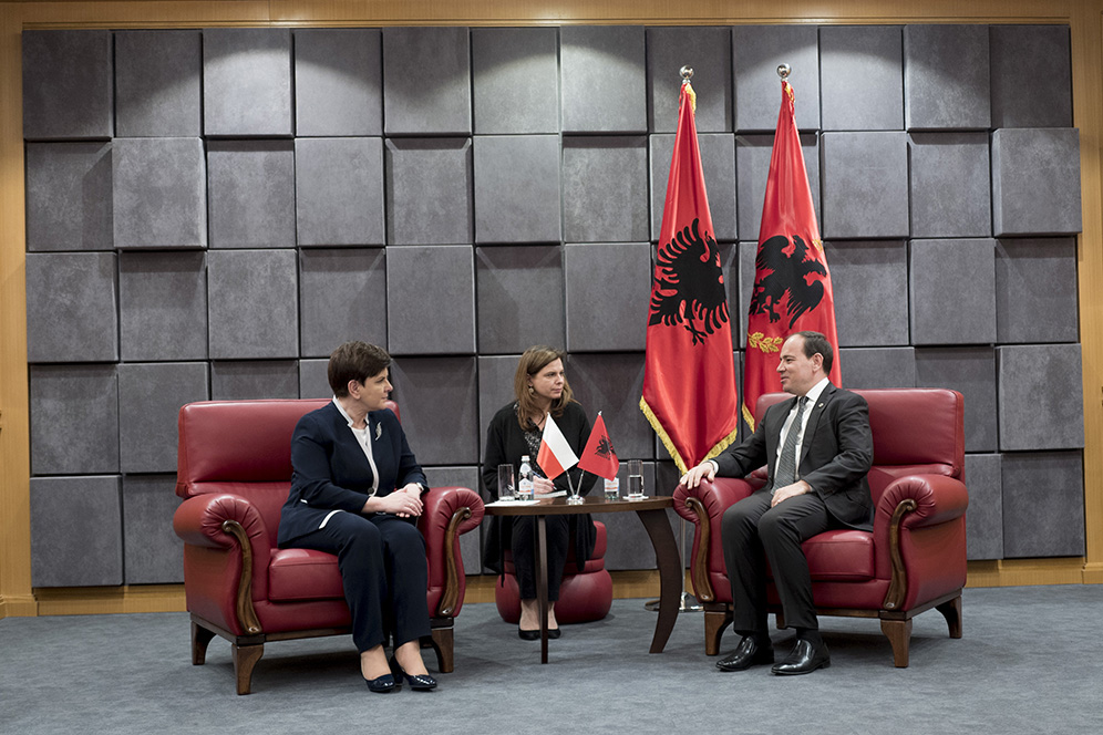 Albania, Tirana. Podczas wizyty w Tiranie premier Beata Szydło spotkała się z premierem Edi Ramą i prezydentem Bujarem Nishanim. Wzięła również udział w Polsko-Albańskim Forum Gospodarczym.